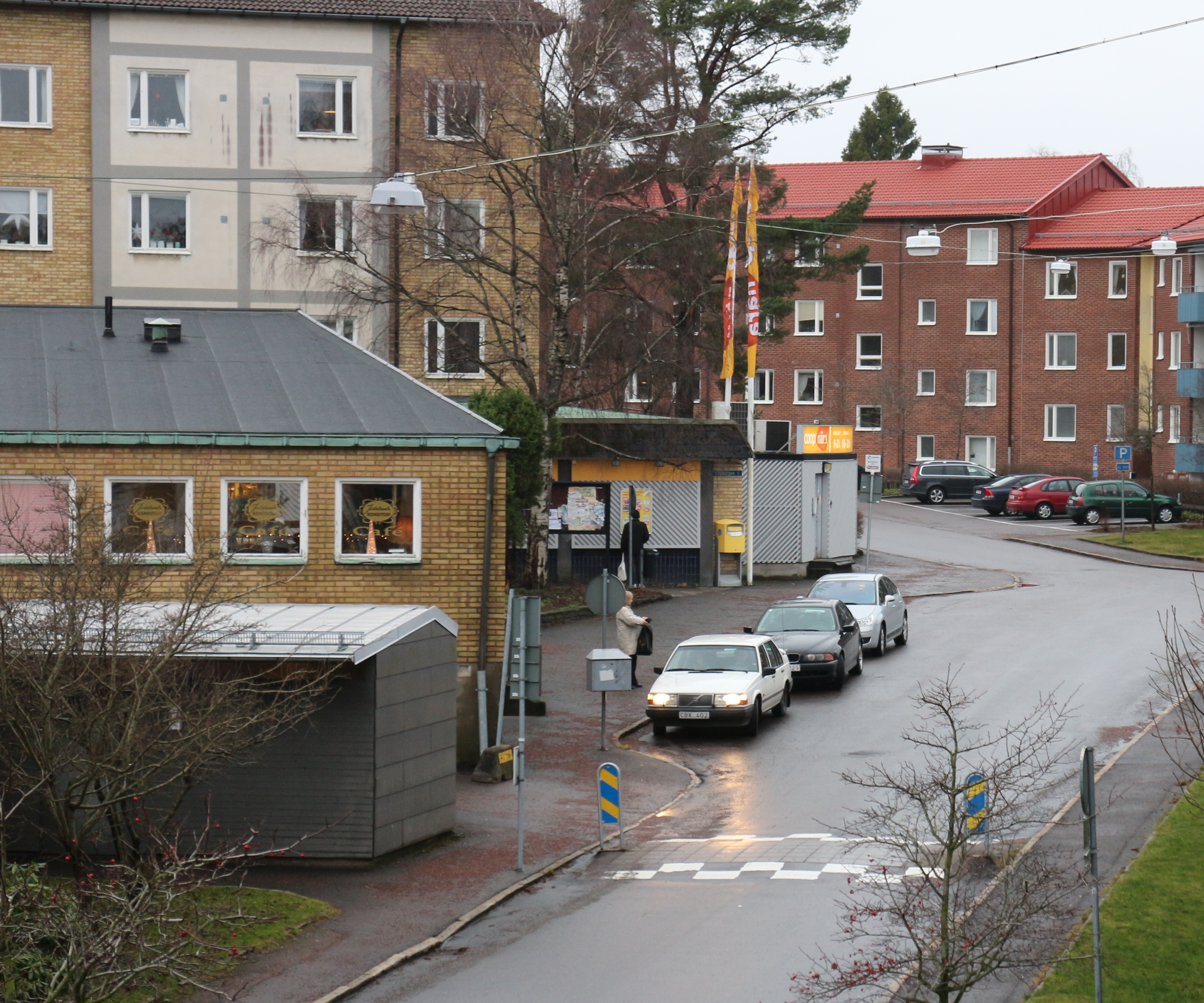 Trätorget i området Björkekärr i stadsdelen Sävenäs, Göteborg.